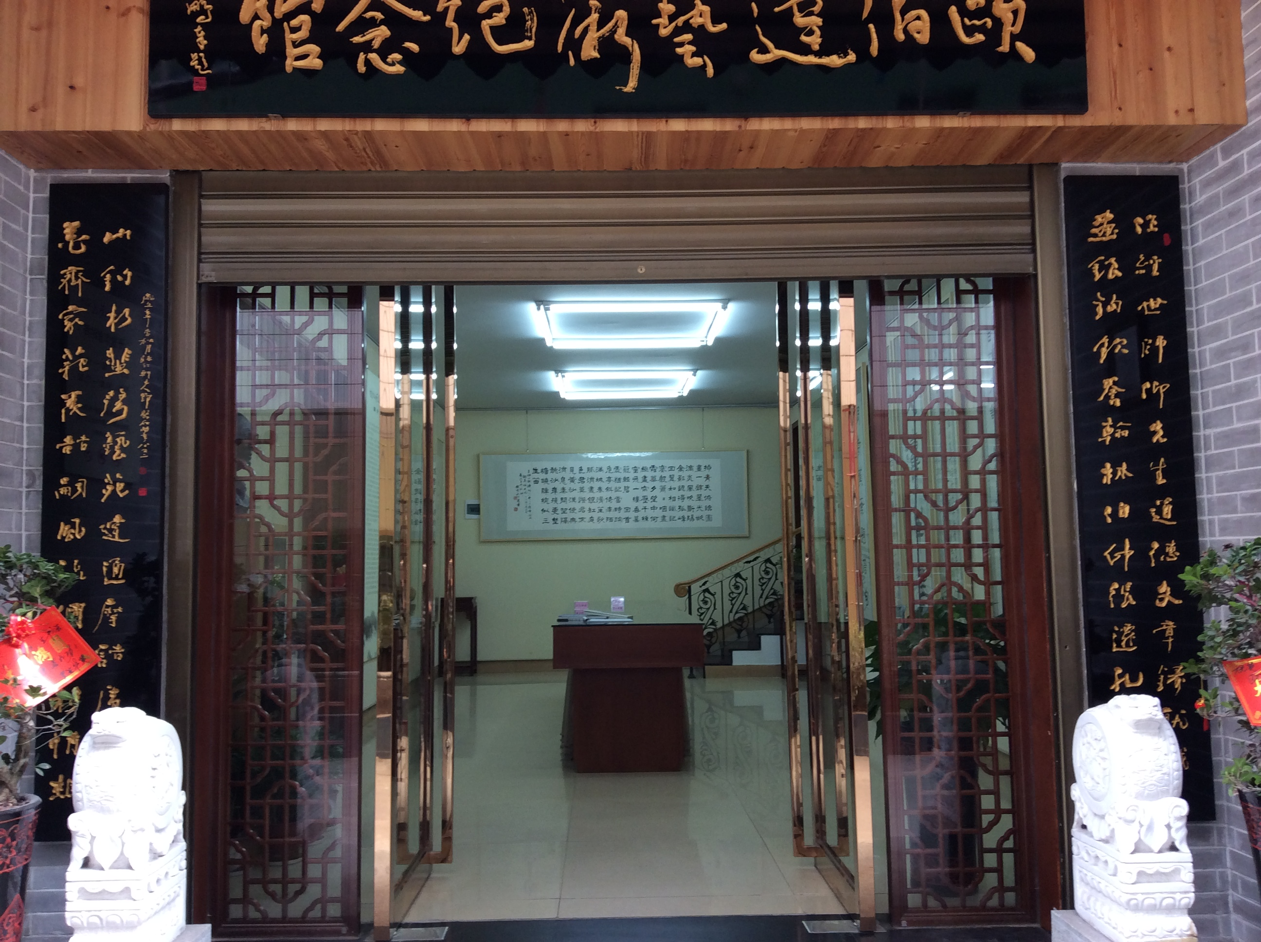 欧伯达艺术纪念馆的正门